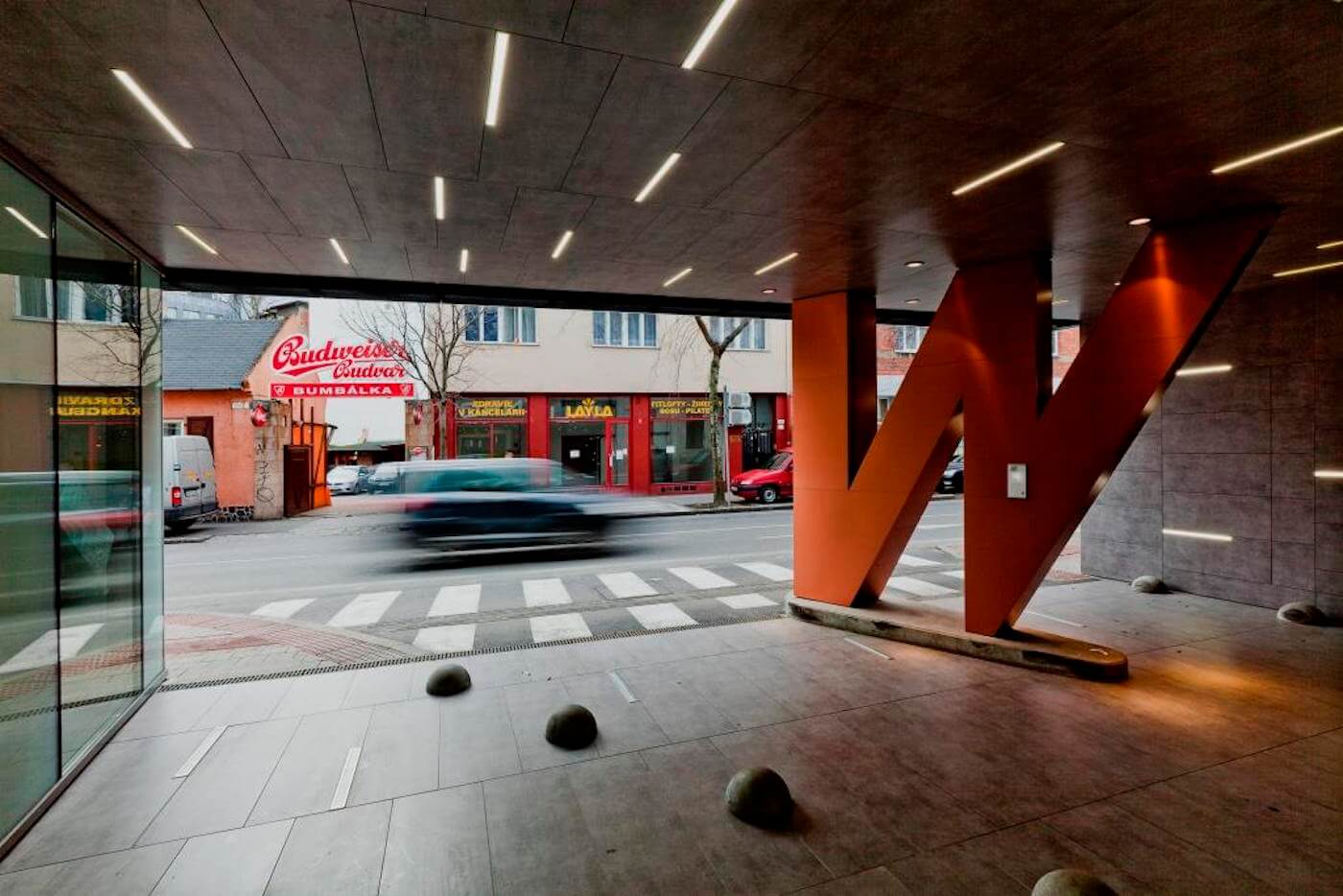 Budova Wallenrod písmeno “W“